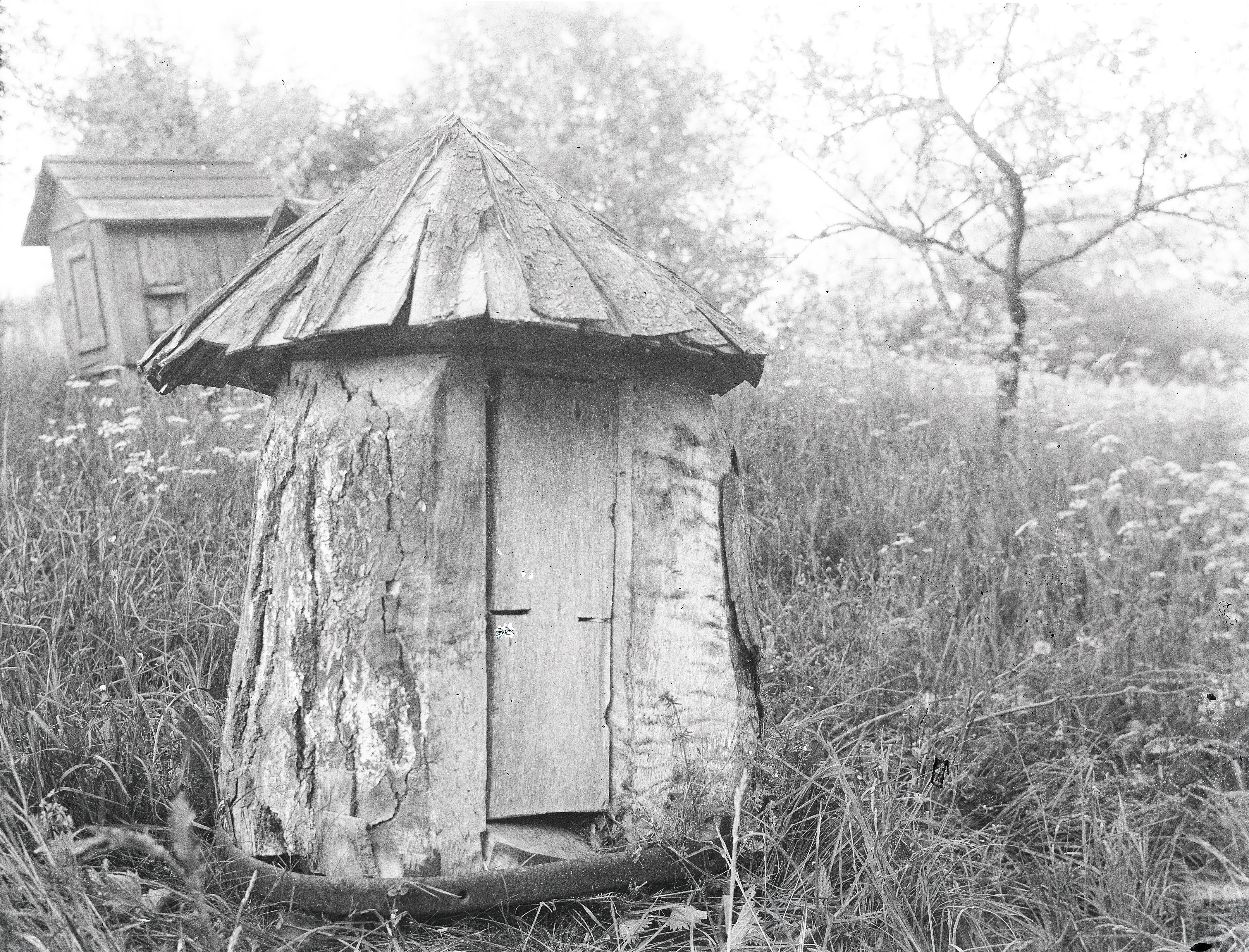 Pakktaru, kasepuust õõnestatud